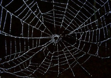 Het spinnenweb van een kruisspin (Araneus diadematus) beladen met dauwdruppels op een vochtige herfstdag.